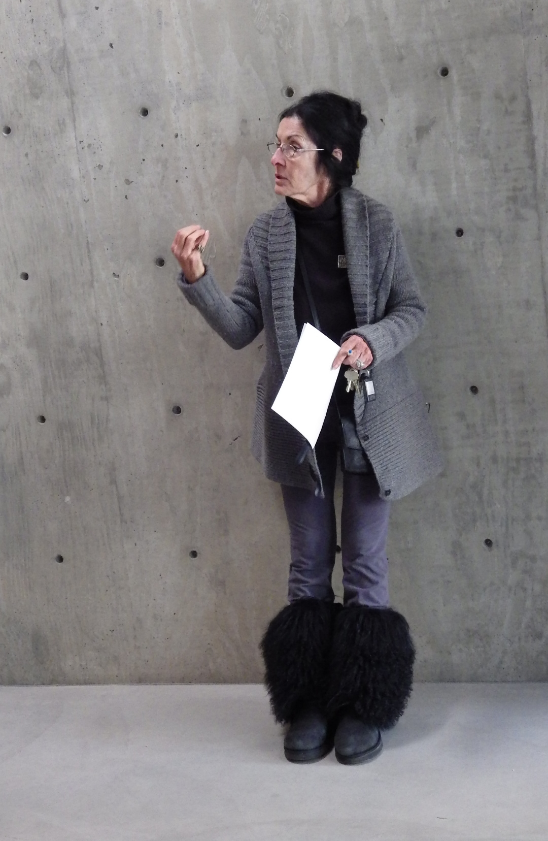 Agnese Udinotti, c. 2014